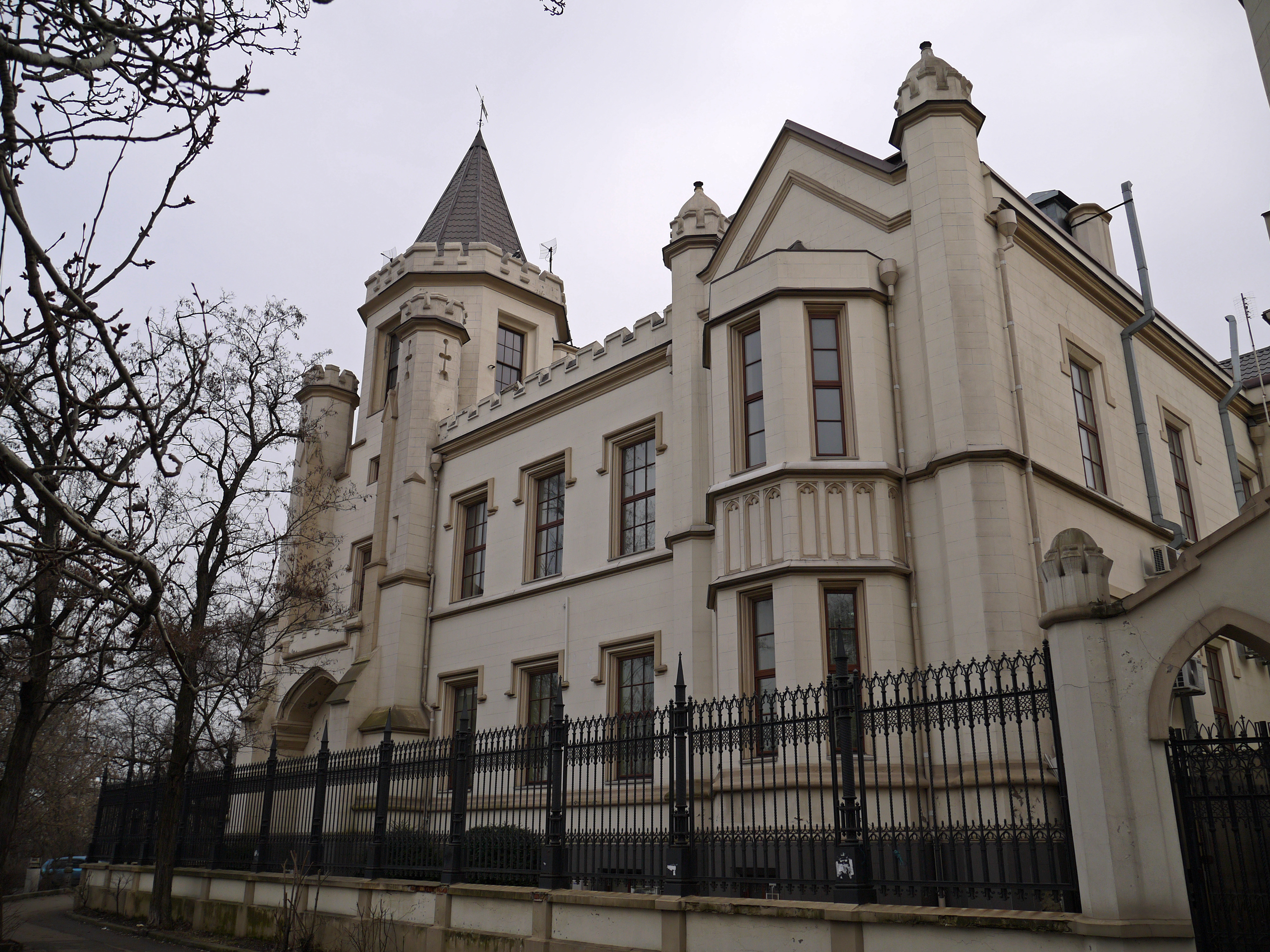 Ансамбль палацу Бжозовського (“Шахського”). Палац, Одеса, Гоголя вул., 2